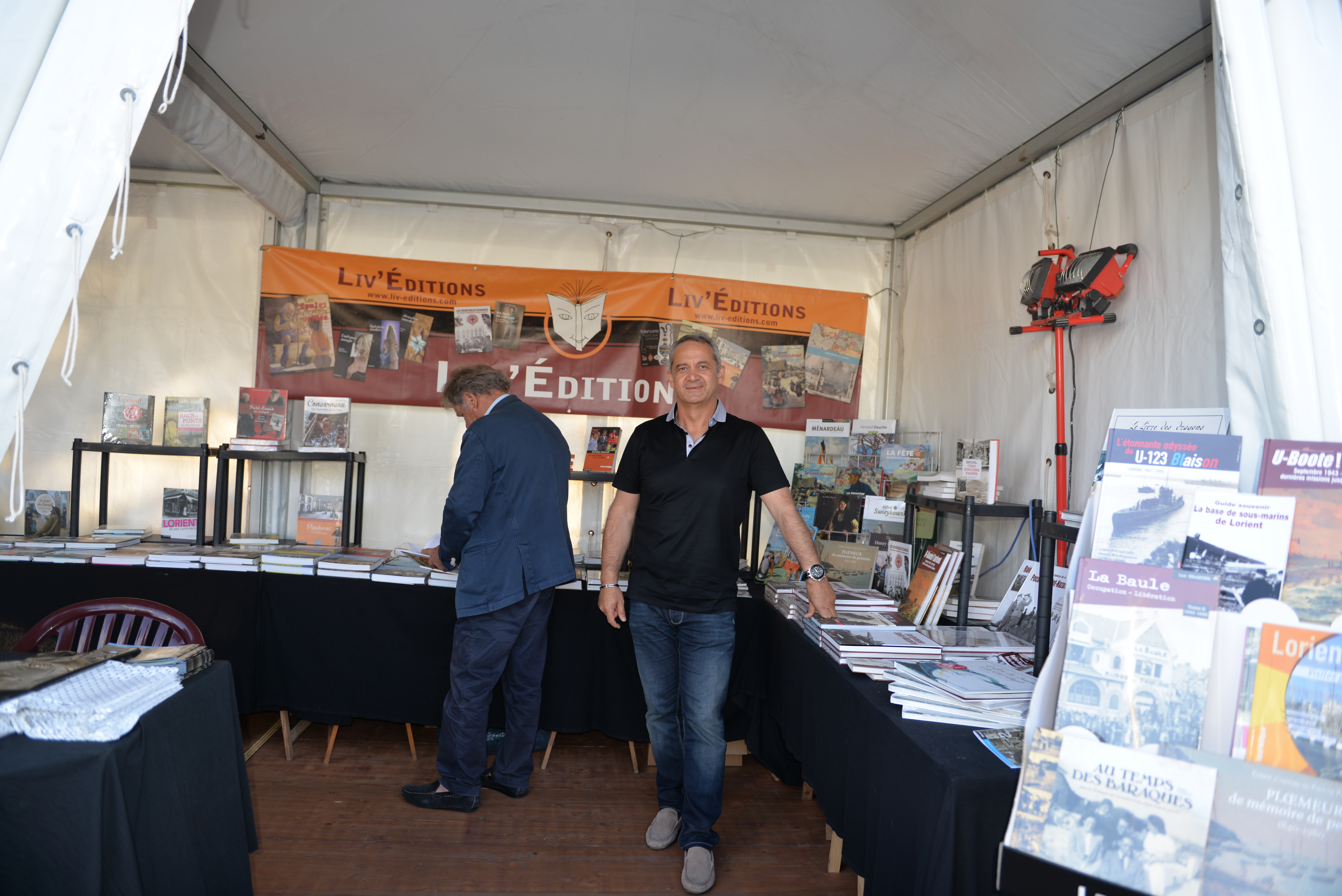 Festival interceltique de Lorient d'août 2016 - Quai du livre - Stand de Liv'Editions